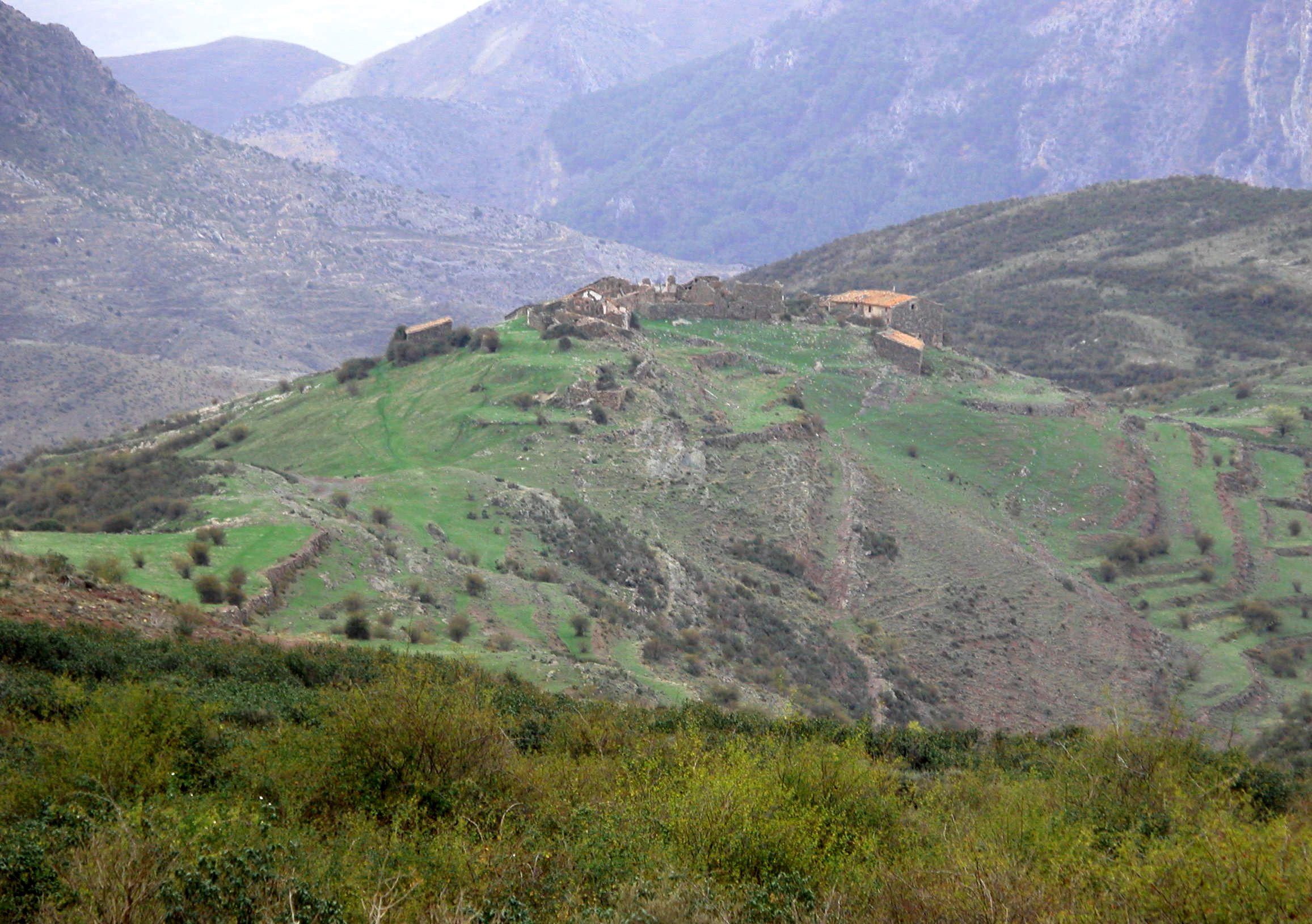 ANTOÑANZAS. Vista Panorámica de esta deshabitada aldea.